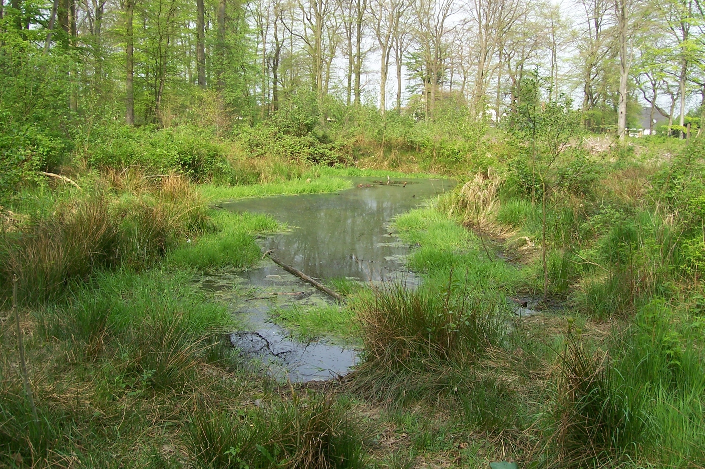 Tümpel in Deutschland